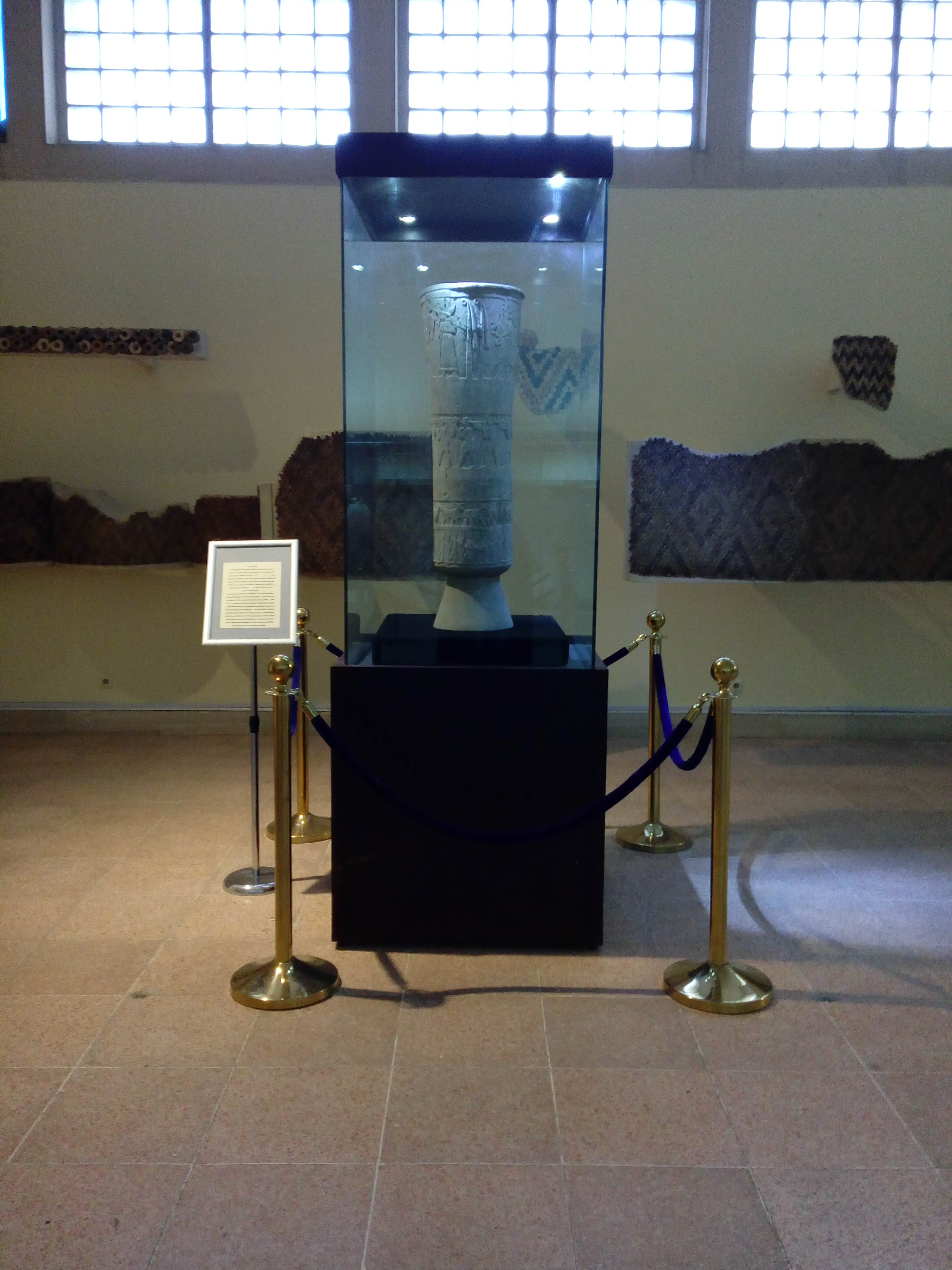 هو إناء كبير من حجر الكلس الأبيض يعتبر من أثمن المعروضات في المتحف العراقي، عثر عليه في الوركاء يعود زمنه إلى عصر جَمدة نصر (3000-2900 ق.م) وقد نقشت عليه مناظر طقوس دينية تمثل مواكب الكهنة وهم يحملون سلال وجرار فيها فاكهة وزيت وخمر يتقدمهم شخص كبير قد يكون ملك أو إله ويتبع هذا الموكب صفوف من الأكباش والنعاج وسنابل القمح وأشجار النخيل، وهو من الأثار التي سرقت أثناء أحداث (2003) وأعيد إلى المَتحف العراقي (المعروف بالاناء النذري).